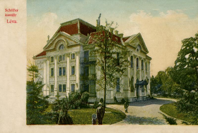 Léva, Schöller kastély,1910